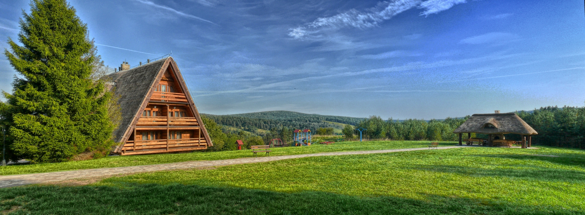 Teren byłego Ośrodka Wypoczynkowego Urzędu Rady Ministrów PRL, obecnie ogólnie dostępny. Widoczna willa w stylu zakopiańskim, niegdyś miejsce wypoczynku wysokich rangą członków PZPR.